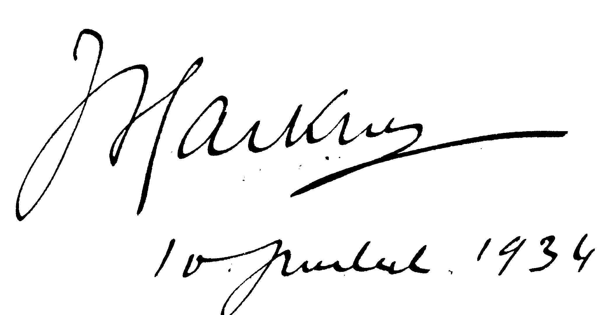 dédicace de Hackins à Coville, 1934